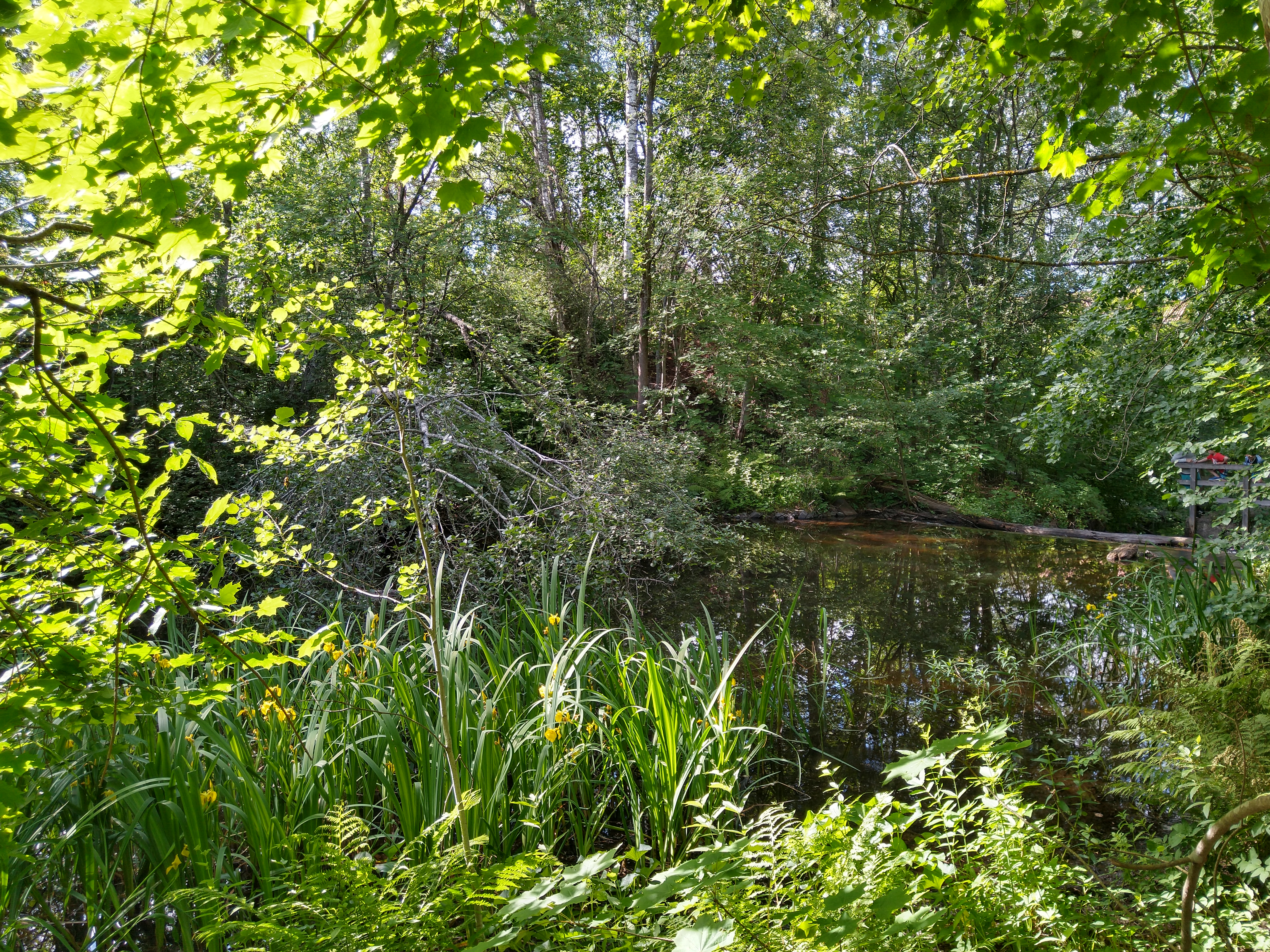 luontopolku Urpolan luonnonsuojelualueella